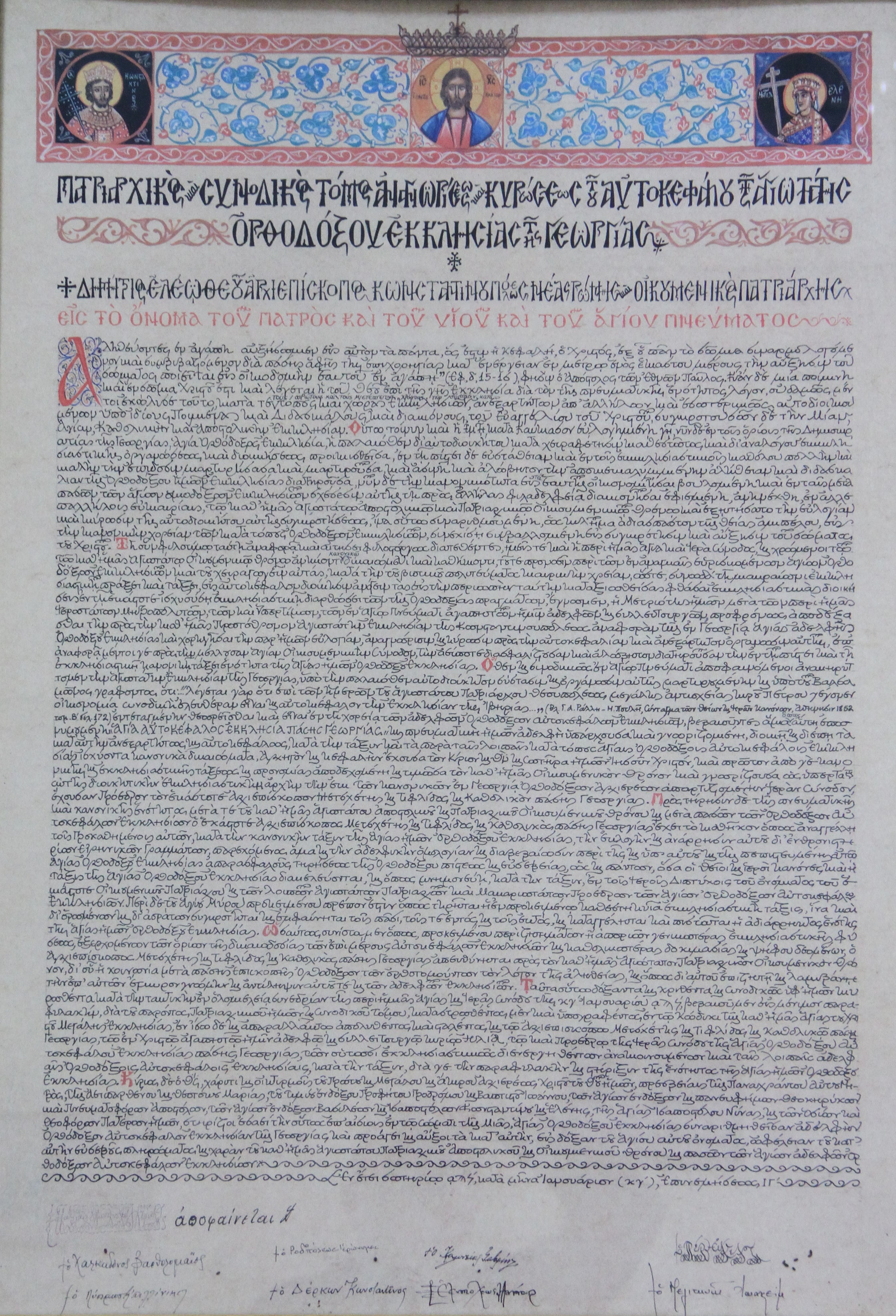 კონსტანტინოპოლის მართლმადიდებელი ეკლესიის მიერ ავტოკეფალიის აღდგენის სიგელი 1990 წელი.